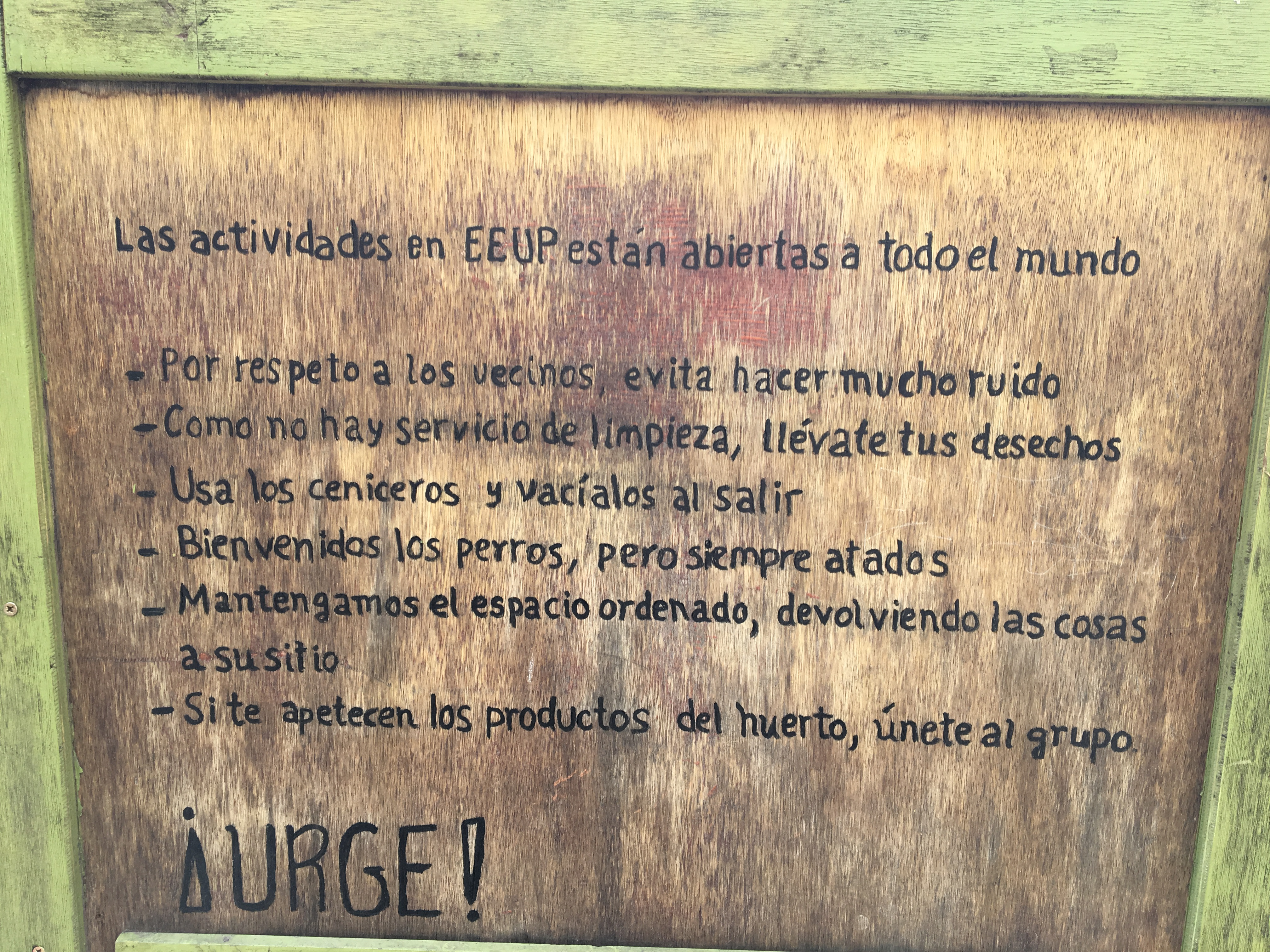 Regras de funcionamento de Esta es una plaza